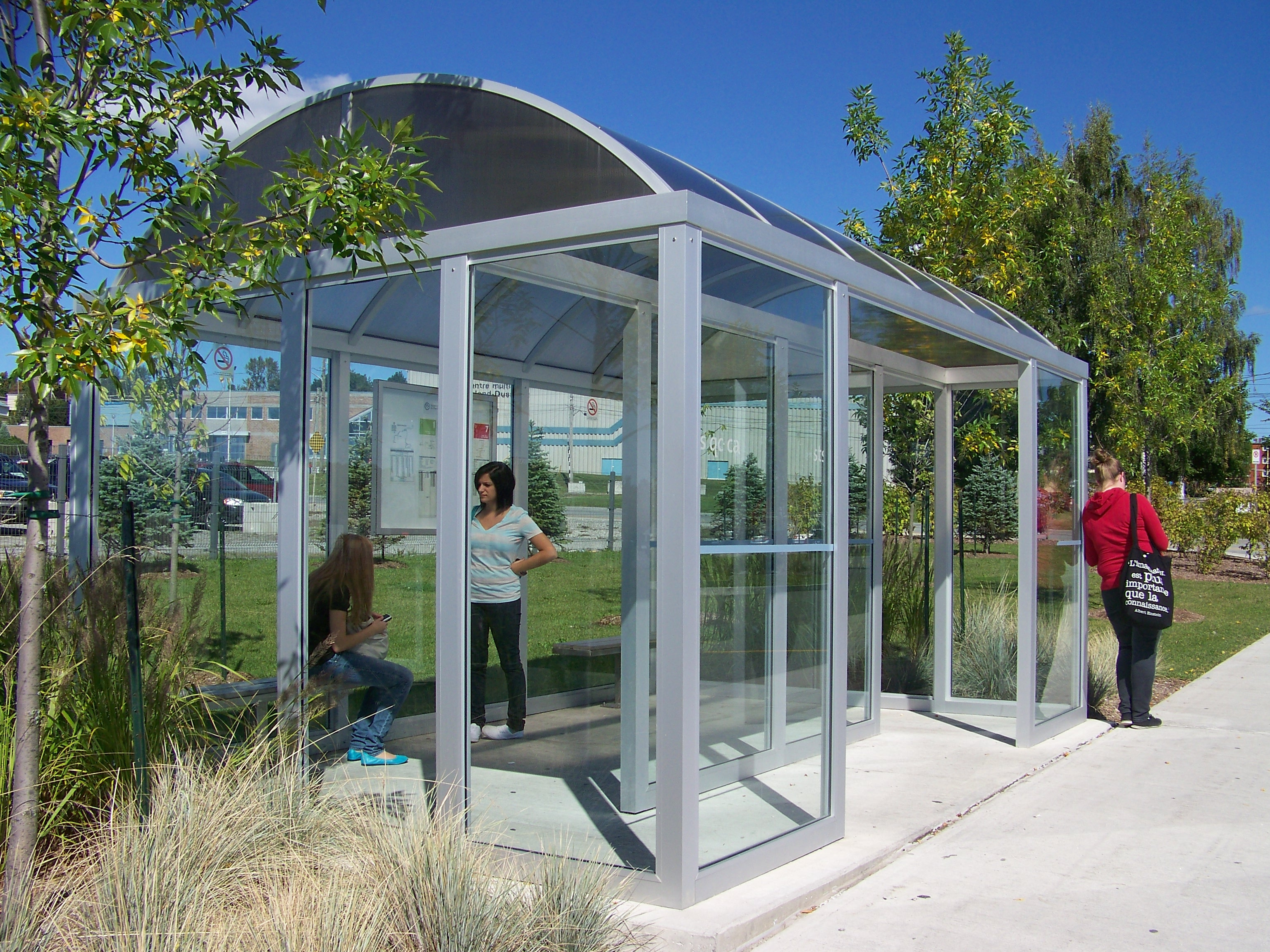 Société de transport de Sherbrooke